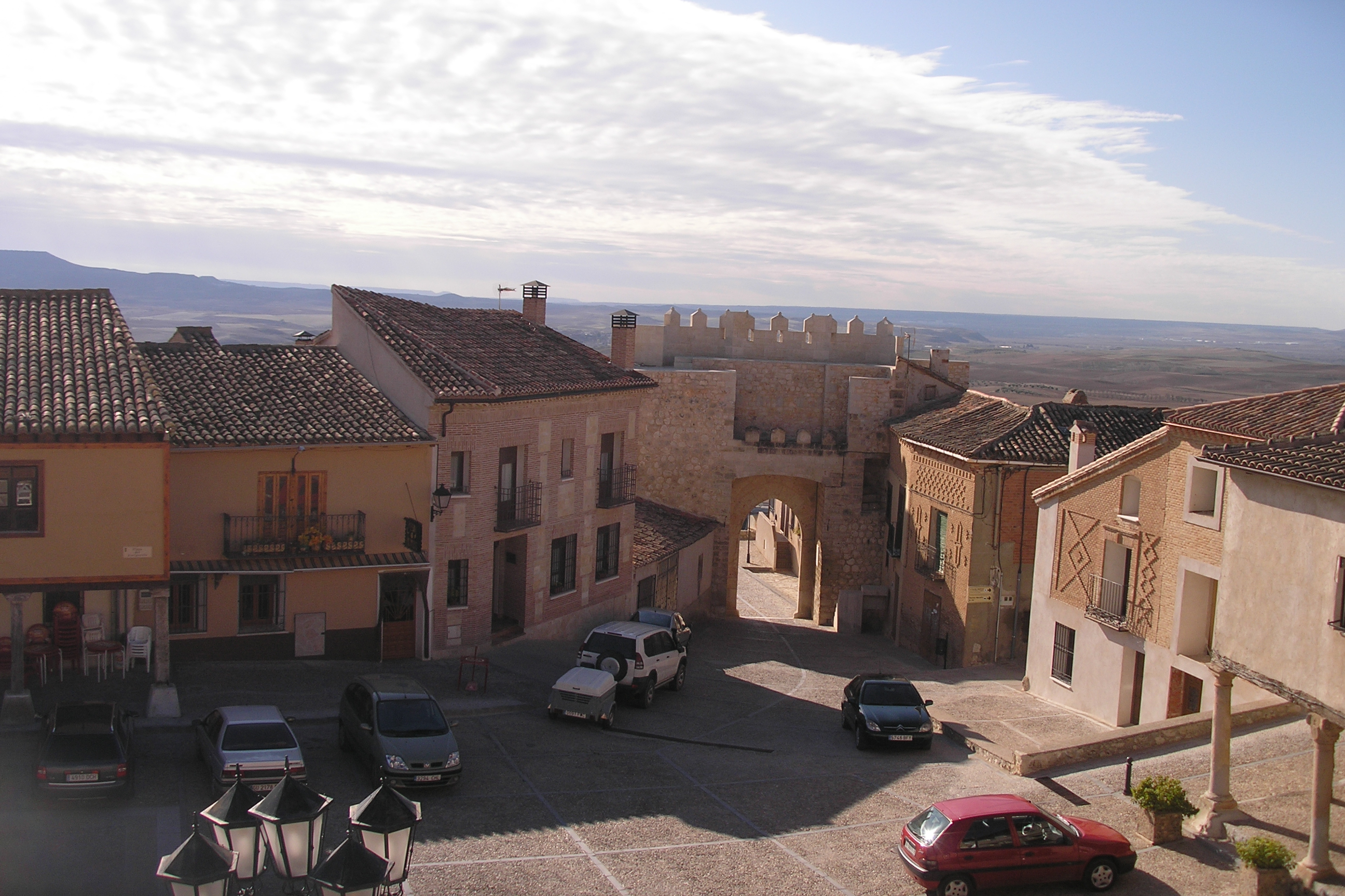 Plaza principal del pueblo, se encuentra nada mas cruzar la Puerta de Santa Maria, resto del antiguo recinto amurallado.